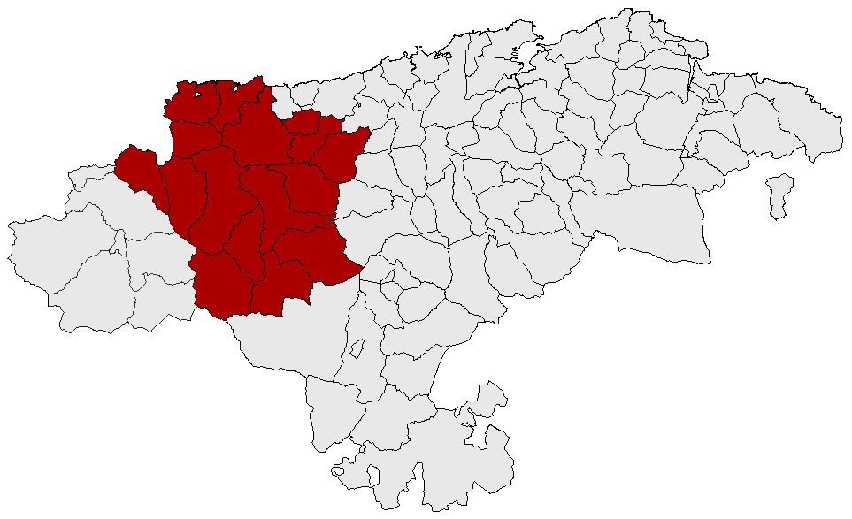 Comarca Saja-Nansa según al división territorial de la Red Cántabra de Desarrollo Rural.